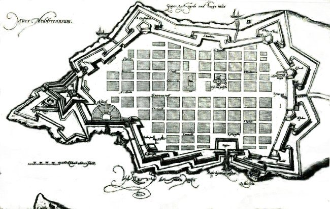 A map of La Valetta